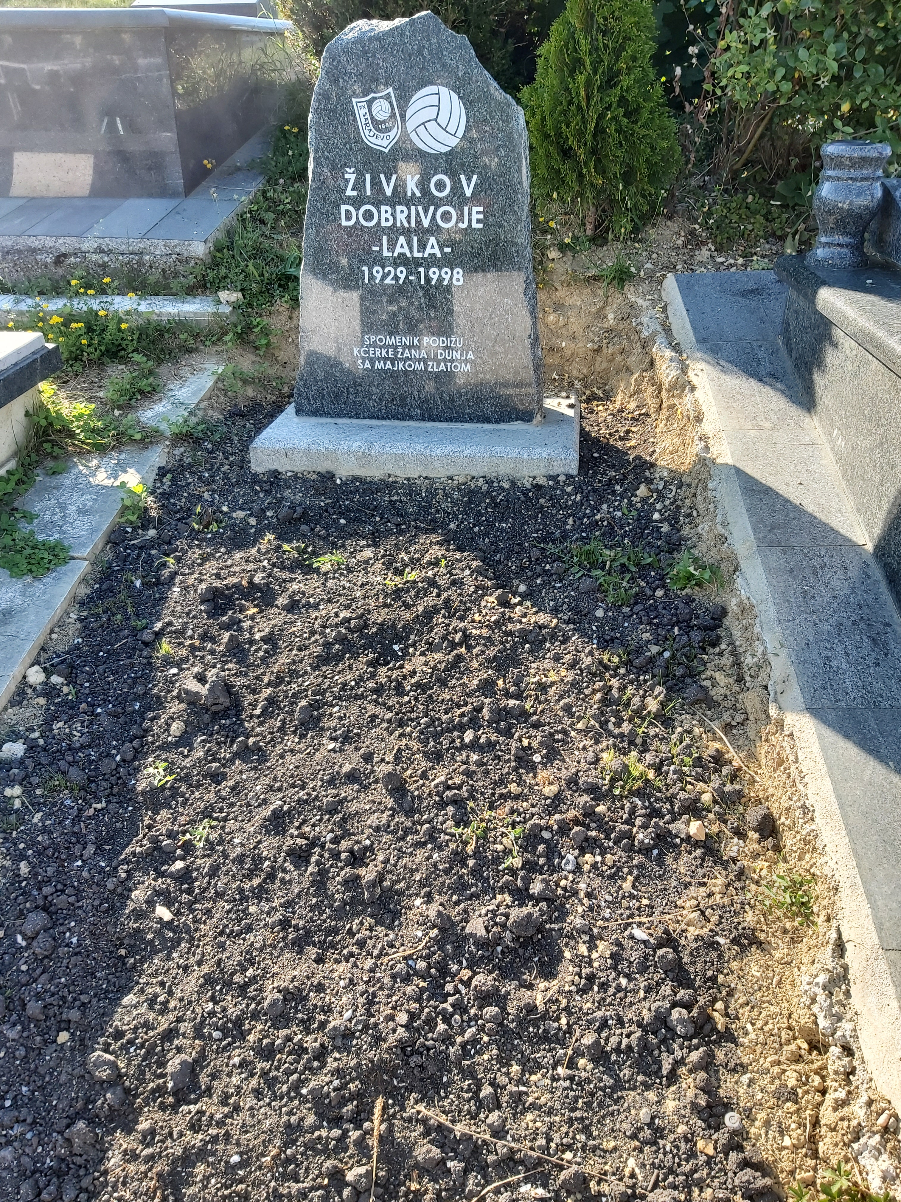 Dobrivoje Živkov, grob